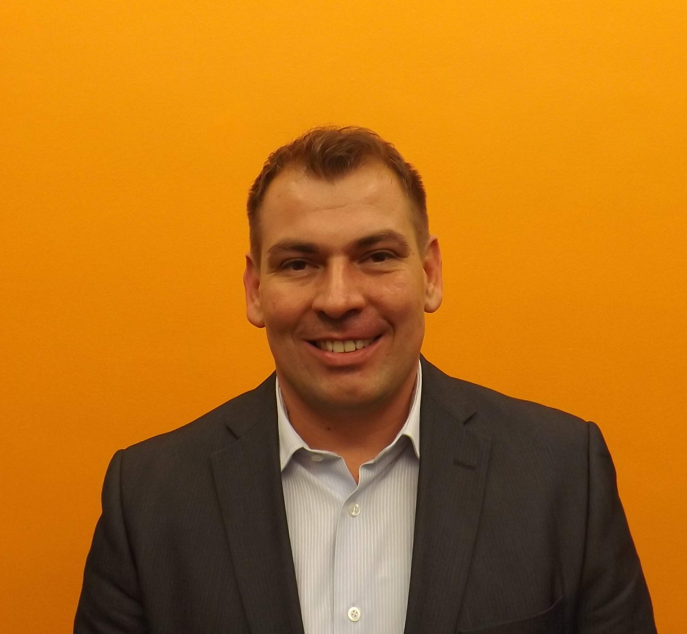 Maciej Wydrzyński, poseł Twojego Ruchu.